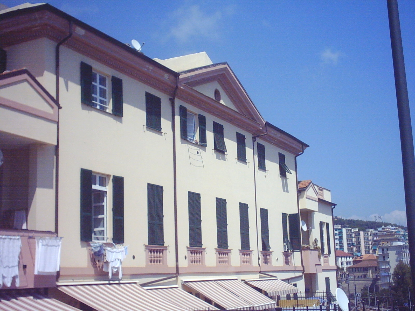 Ex-ospedale Marina Rati, ora poliambulatorio a Cogoleto, Italy